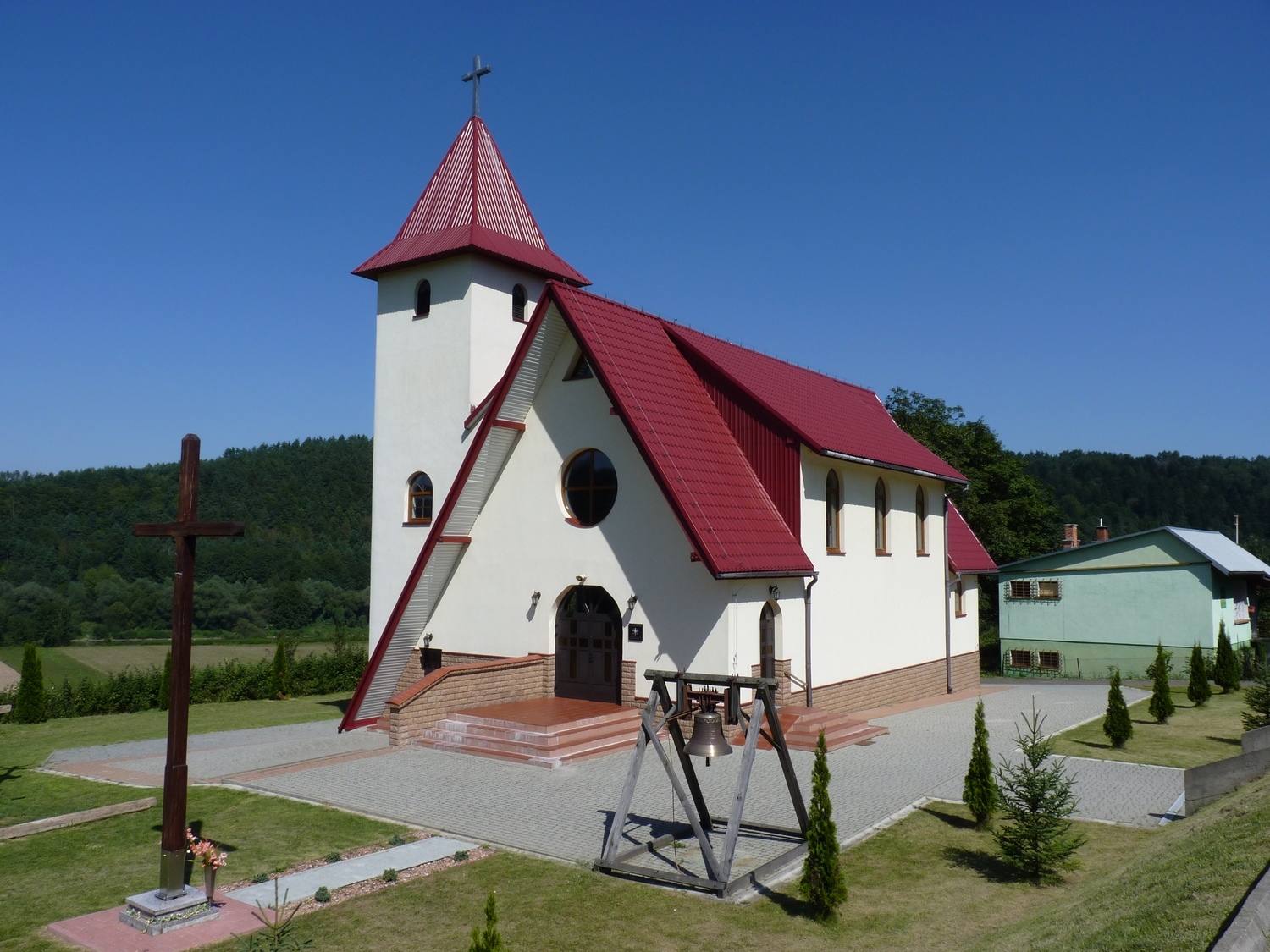 Nowy kościół Matki Boskiej Anielskiej